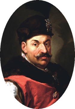 Король Стефан Баторій